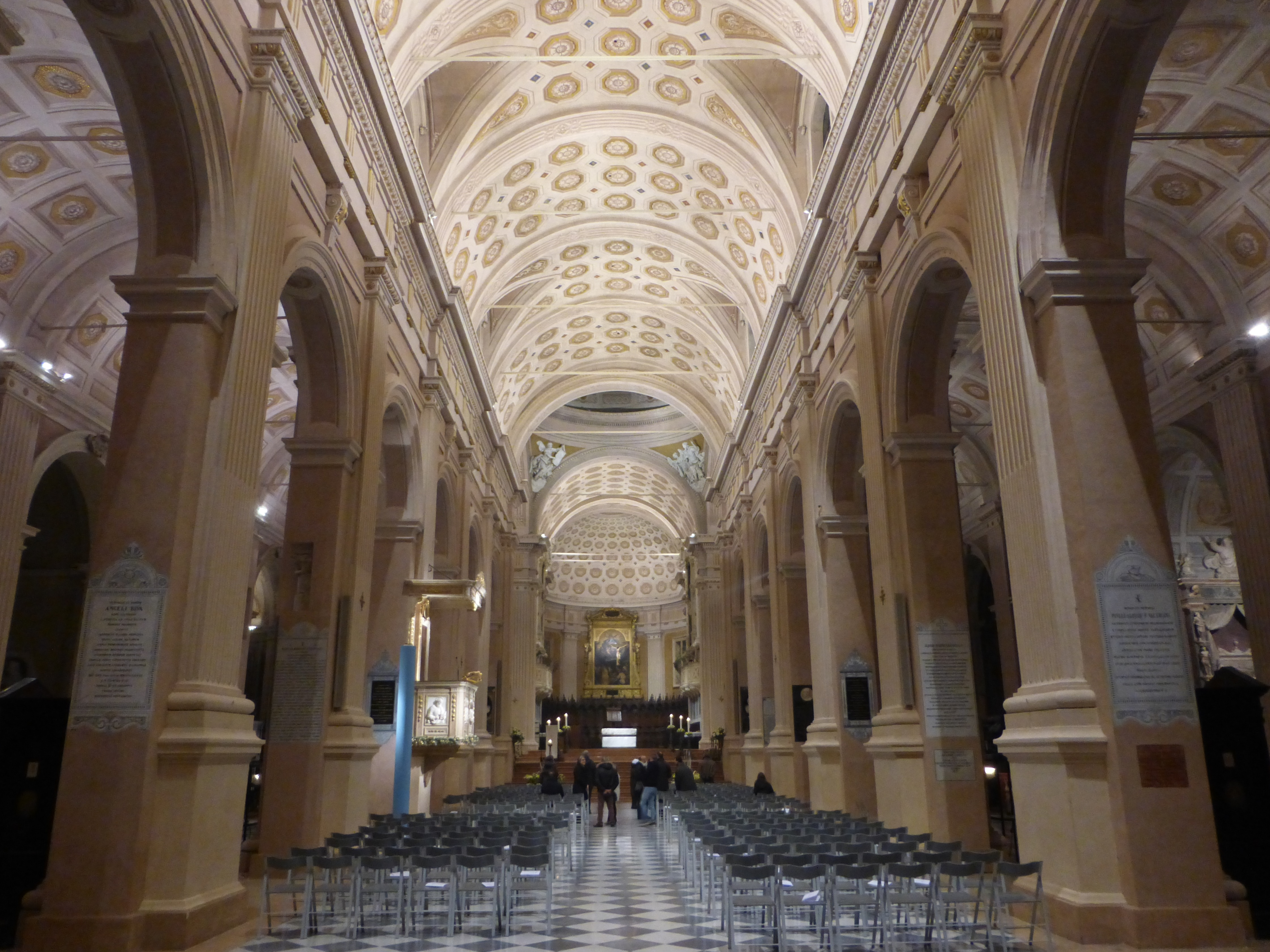 Veduta dell'interno del duomo di Reggio Emilia